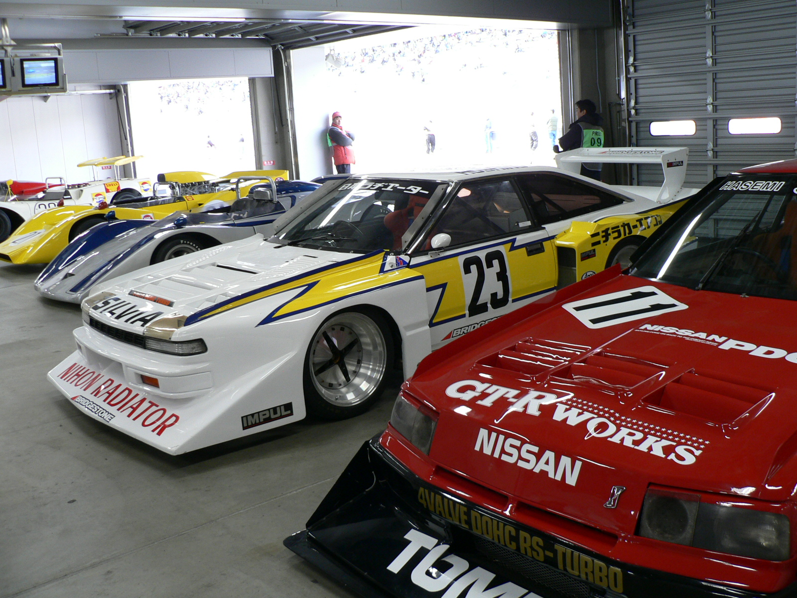 S110シルビア・シルエットフォーミュラ。 NISMO FESTIVAL 2006にて撮影。